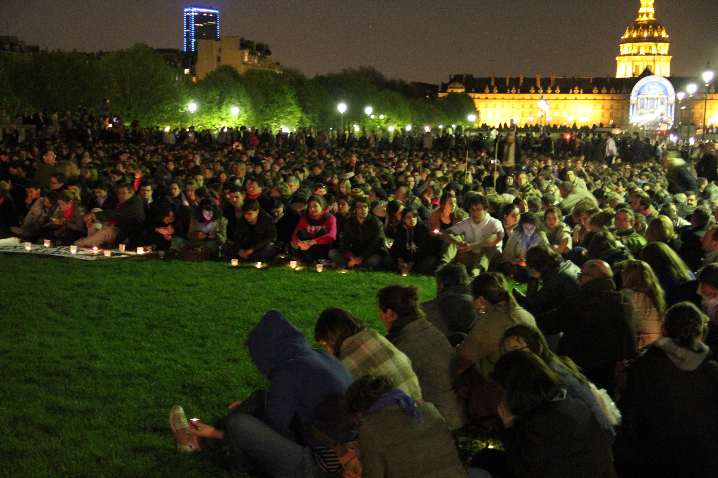 Soirée des veilleurs aux Invalides le 23 avril 2013